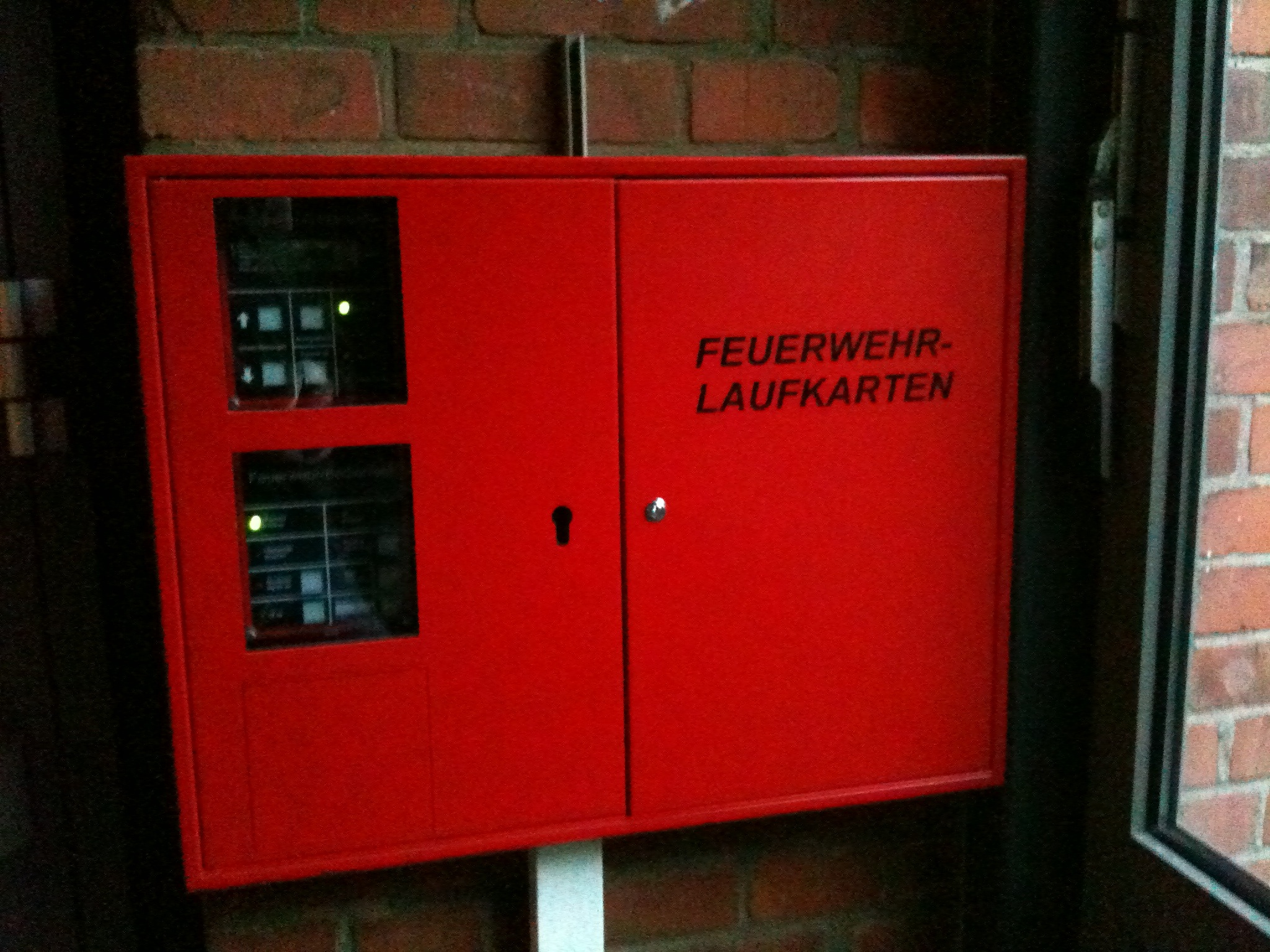 Brandmeldezentrale mit Feuerwehrlaufkarten